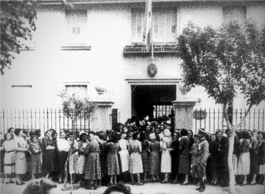 Primer sufragio femenino en Santa Rosa, provincia Eva Perón, Argentina en 1951.